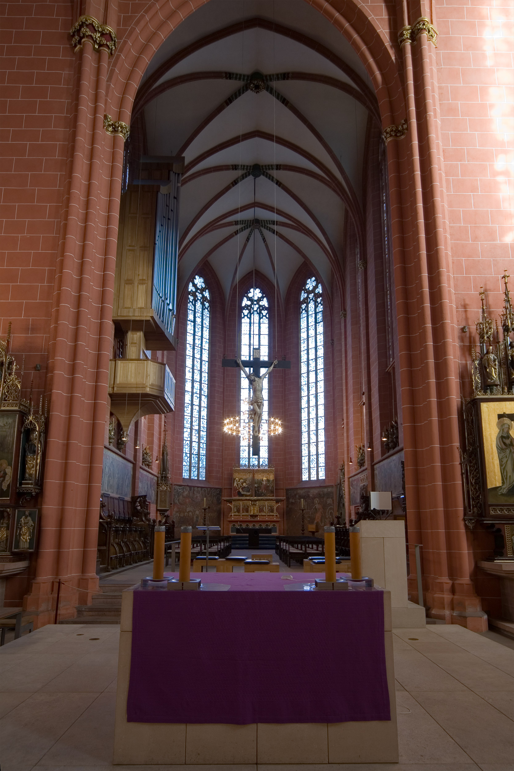 Blick in den Hochchor des Kaiserdoms St. Bartholomäus in Frankfurt am Main. Selber fotografiert im Februar 2008, Doppellizensierung GFDL & CC-BY-SA 2.5.